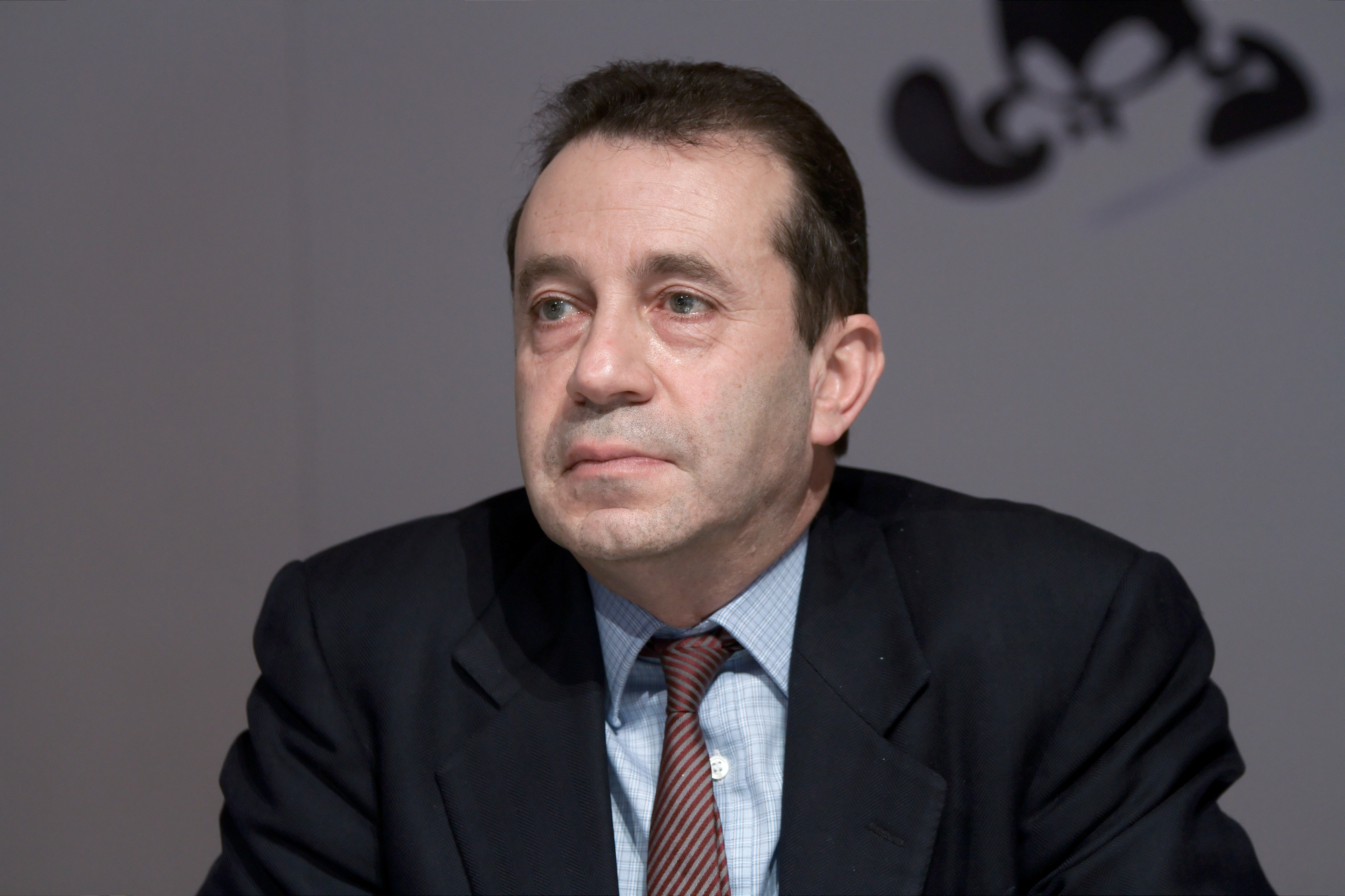 Bruno Racine, président de la Bibliothèque nationale de France, au Salon du livre de Paris lors de la conférence sur Le nouveau Gallica, la bibliothèque numérique de la BnF.